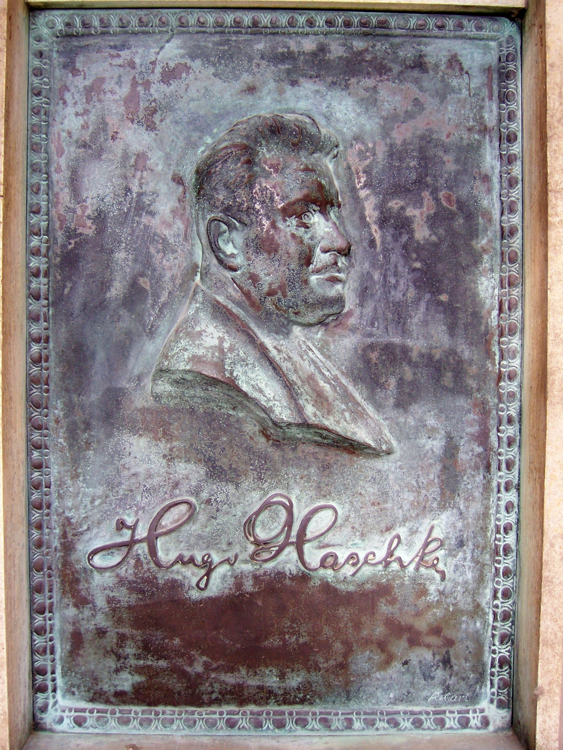 Reinhold Carl: Relief Hugo Haschke